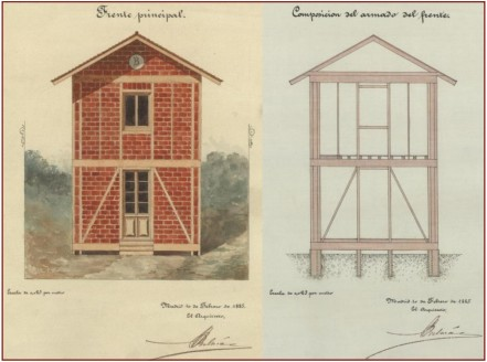 Proyecto de casa para pobres en los pueblos de las provincias de Granada y Málaga que han sufrido los terremotos. Alzado principal (vista completa y estructura). Fuente: Mariano Belmás, arquitecto.